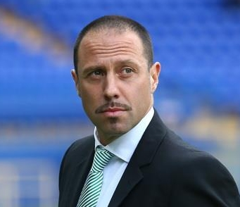 Игор Йовичевич